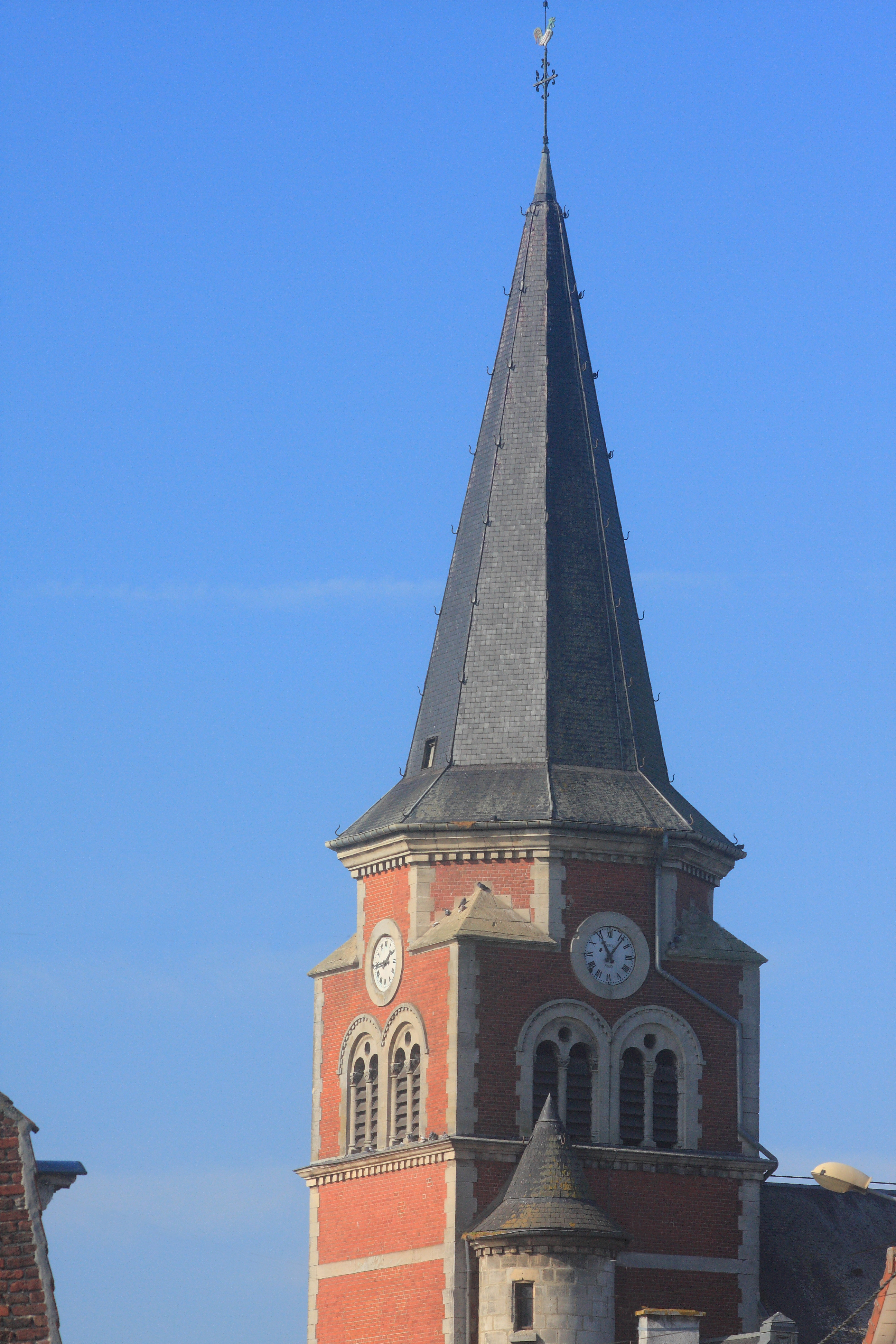 L'église de Roeux